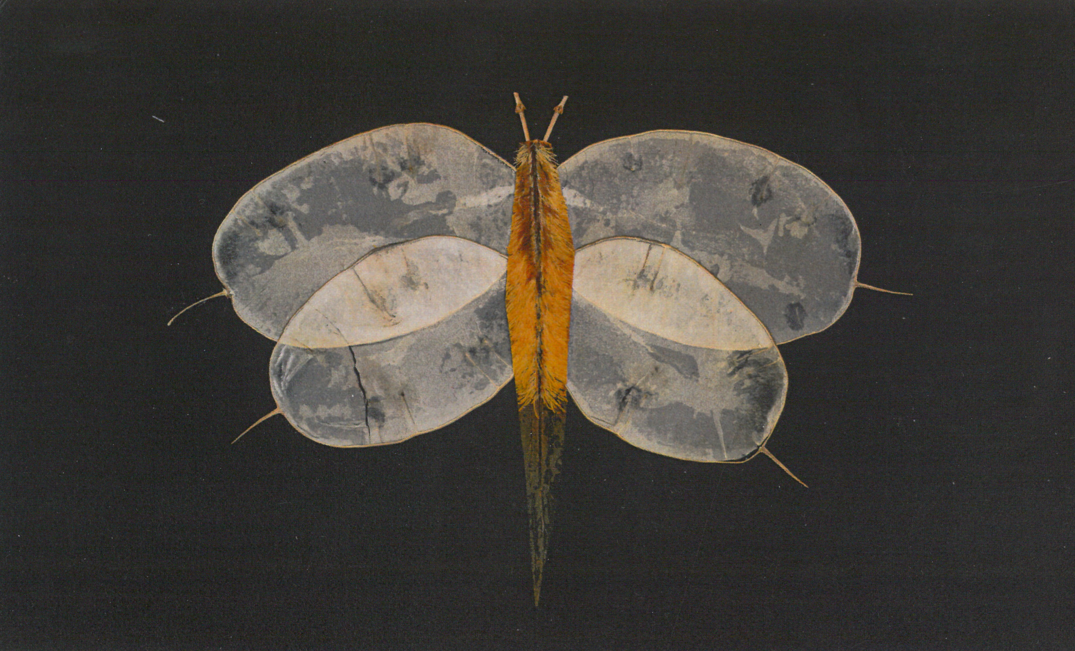 Pétalographie de papillon de nuit (Bernard Schal, Avignon), lunaria